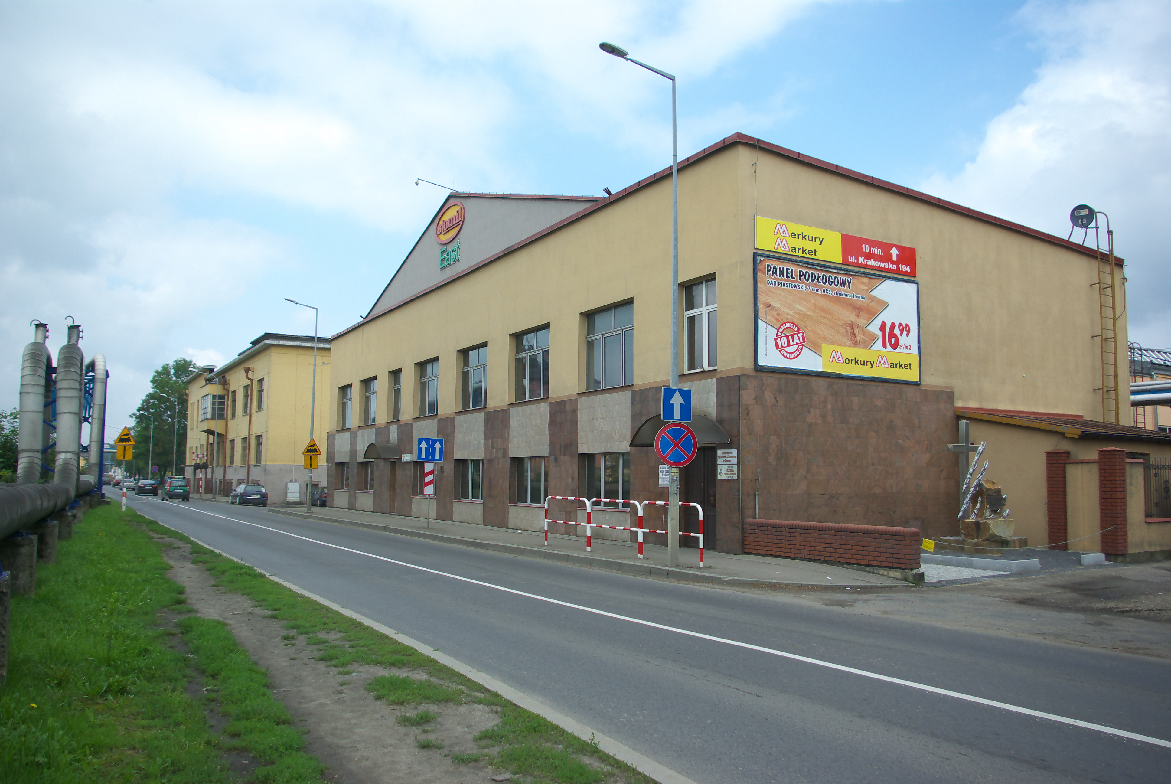 Zabudowania Stomilu Sanok przy ulicy Dworcowej